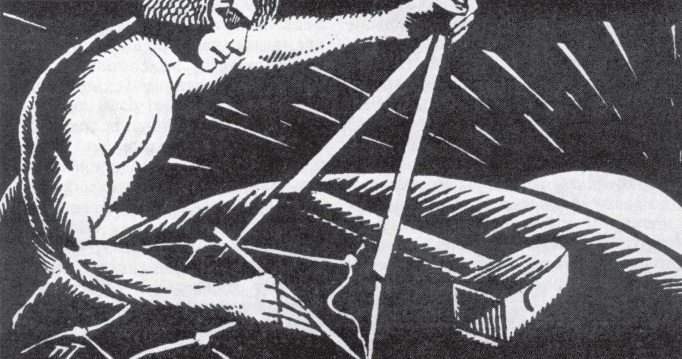 Павел Гуткоўскі. Ілюстрацыя да часопіса Маладняк. 1924. Лінарыт